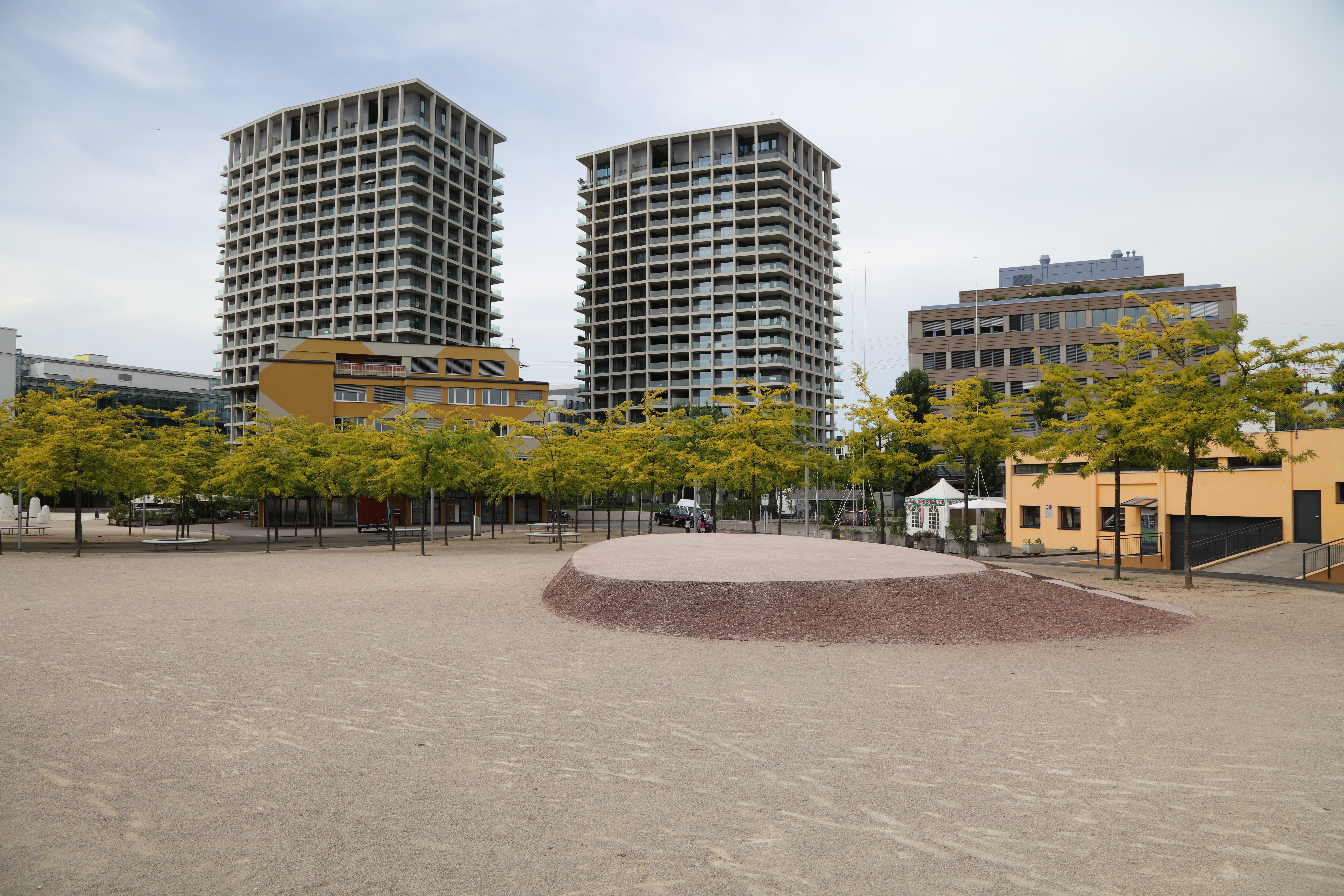 Der Leutschenpark in Zürich Oerlikon. Im Hintergrund die beiden "The Metropolitans" Hochhäuser.